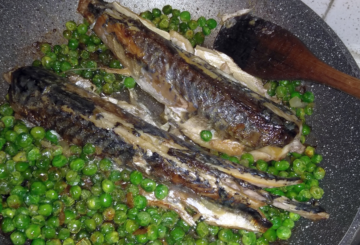 Sgombri con i piselli a fine cottura